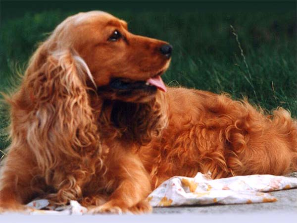 Our dog